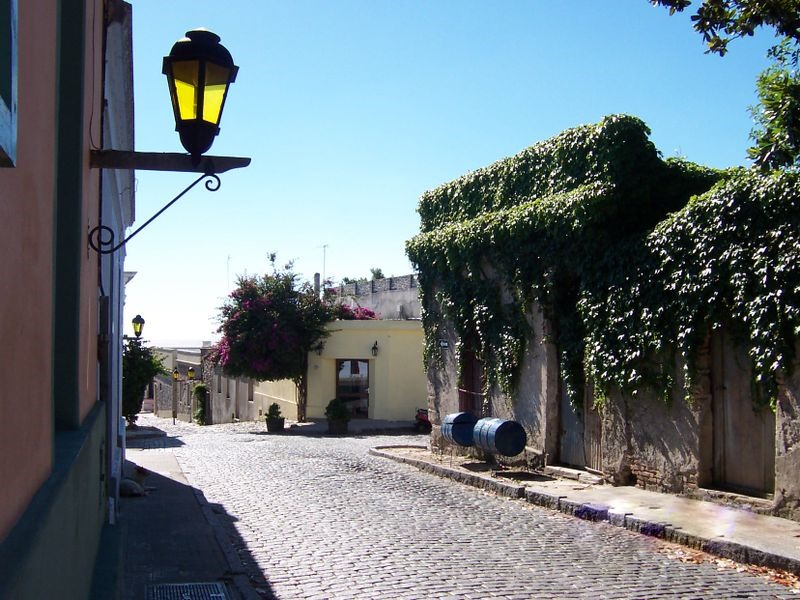 Calle tipica de Colonia del Sacramento Autor: Alfredobi